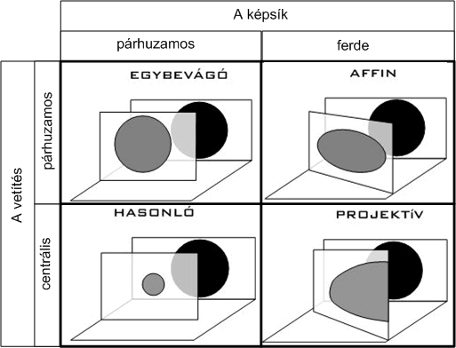 Vetítés variánsai